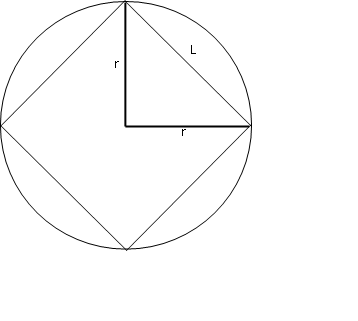 Figura auxiliar per al càlcul de les funcions trigonomètriques de l'angle de 45º